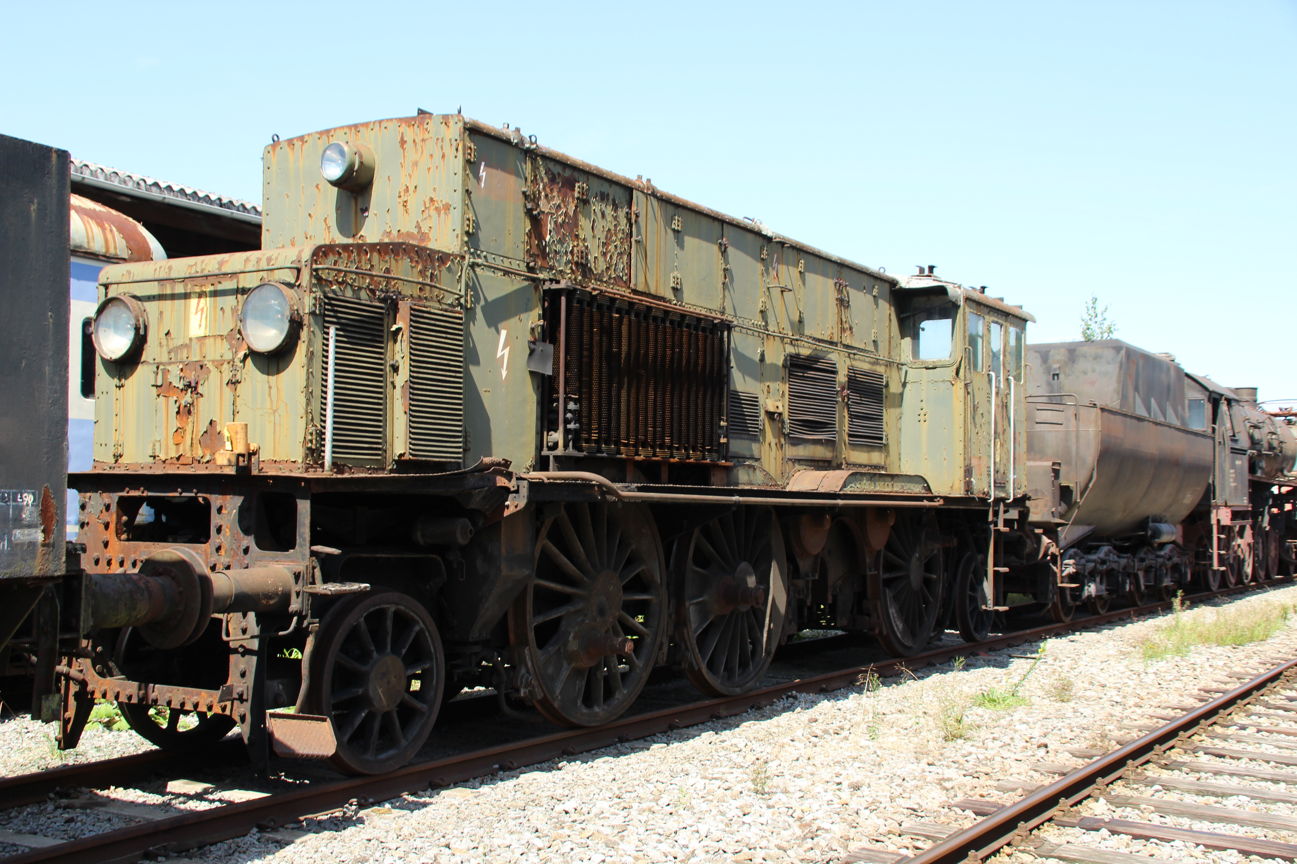 ex ÖBB 1073 08, ex BBÖ 1029 08 diente zuletzt als Zugvorheizanlage, Lok befindet sich im Lokpark Ampflwang